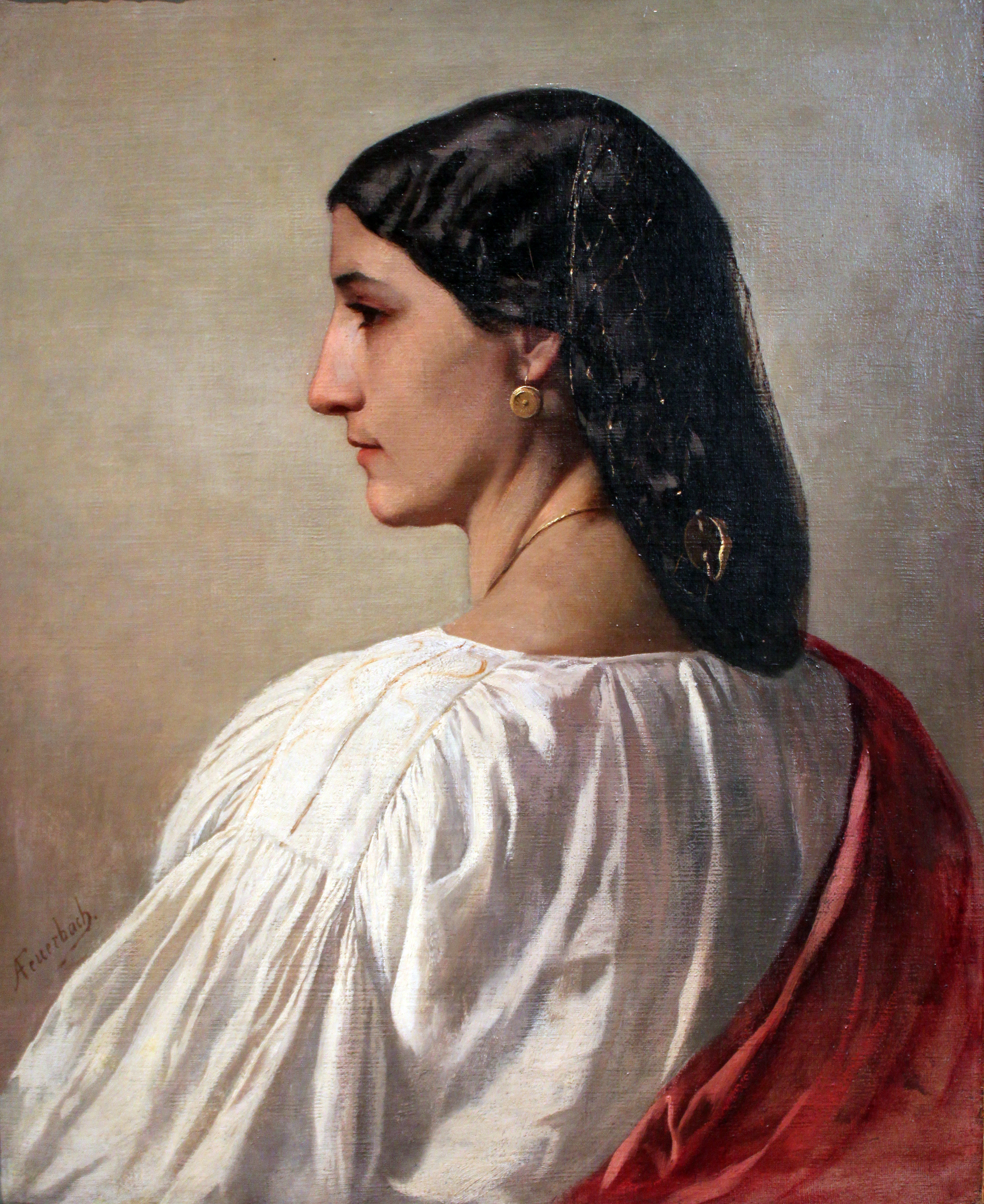 Nanna